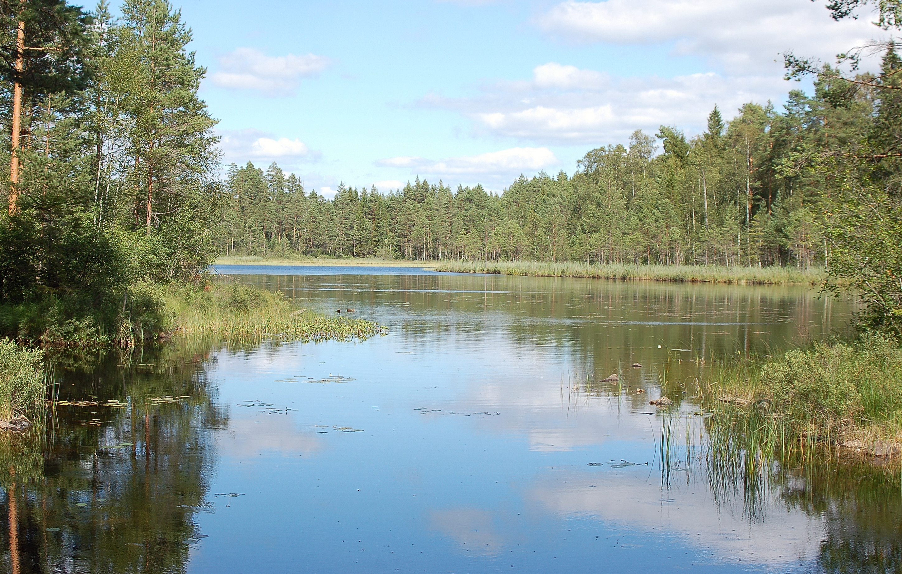 Greånstjärnet är en sjö inom Glaskogens naturreservat i Arvika kommun.